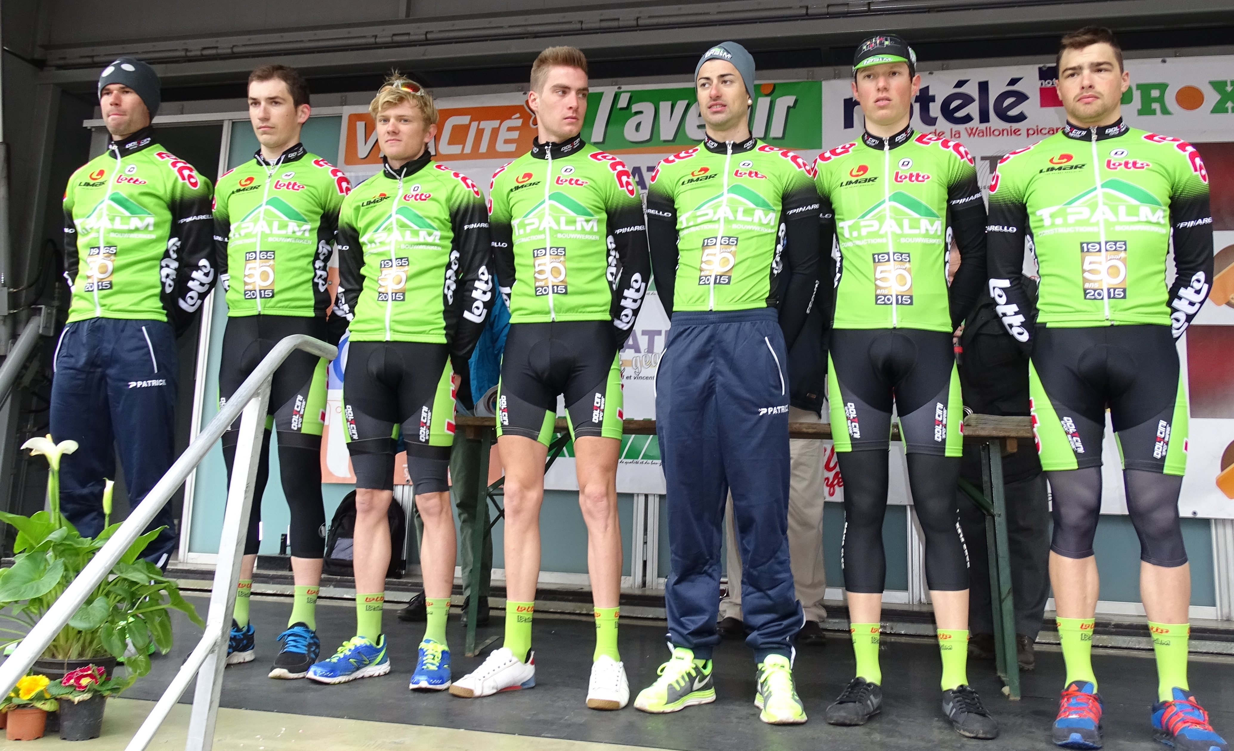 Triptyque des Monts et Châteaux 2015 Depicted team: T.Palm-Pôle Continental Wallon